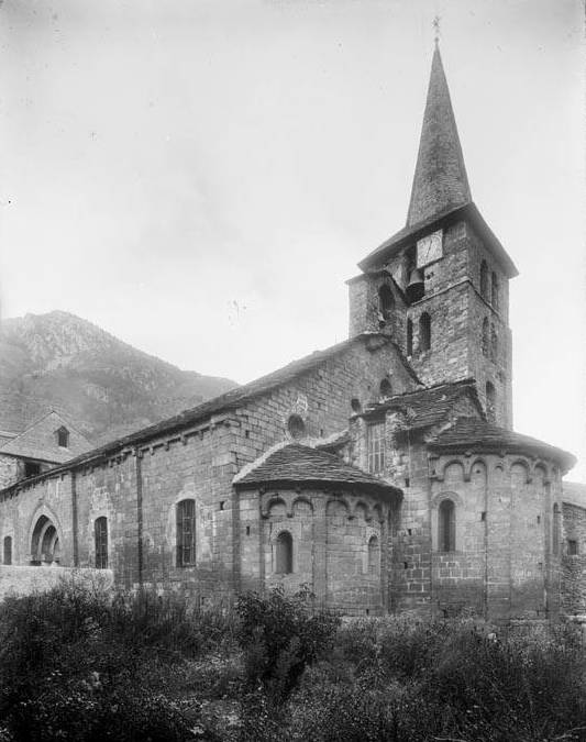 Imatge